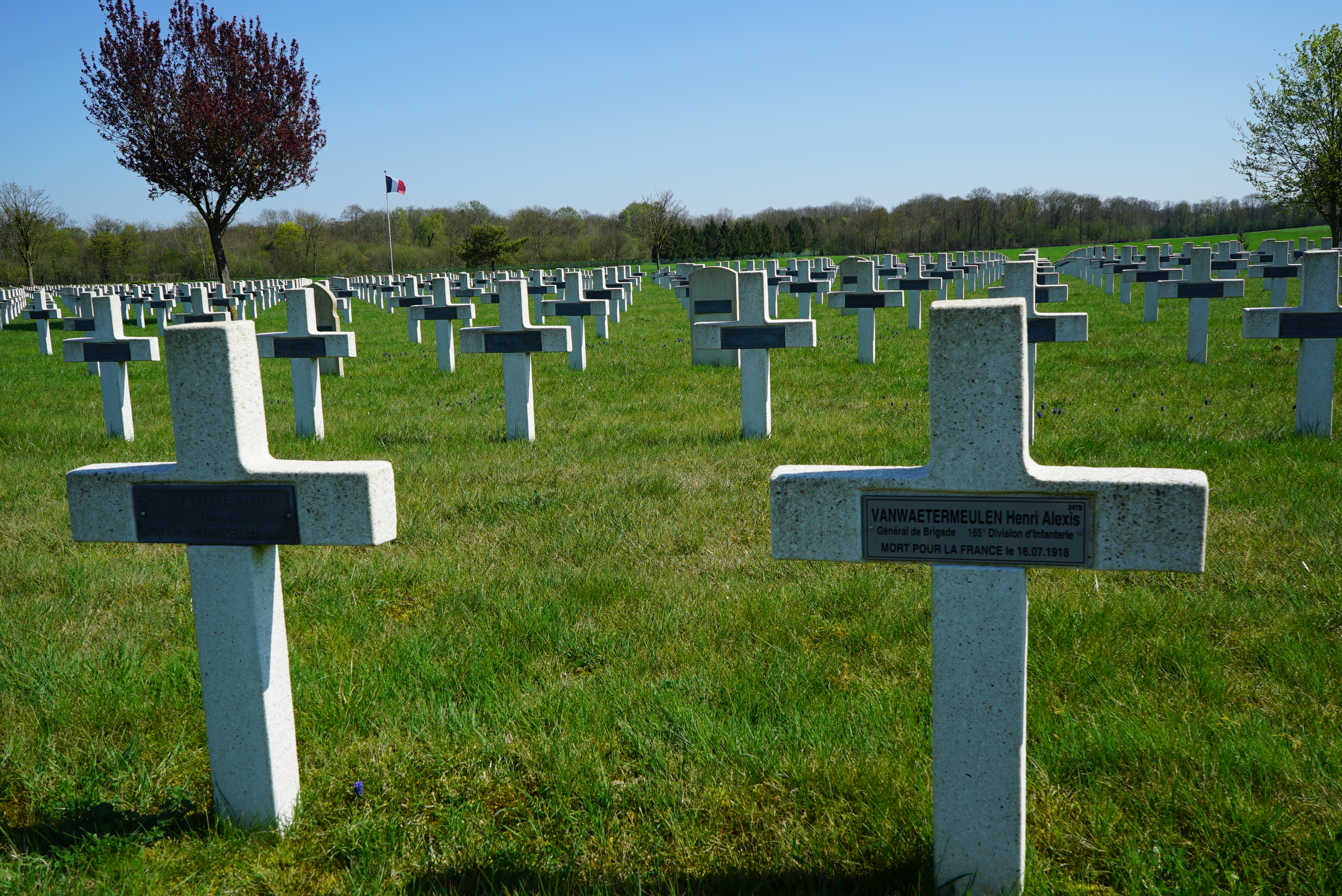 topmbe du général Vanwaetermeulen en la Nécropole nationale de Sept-Saulx.